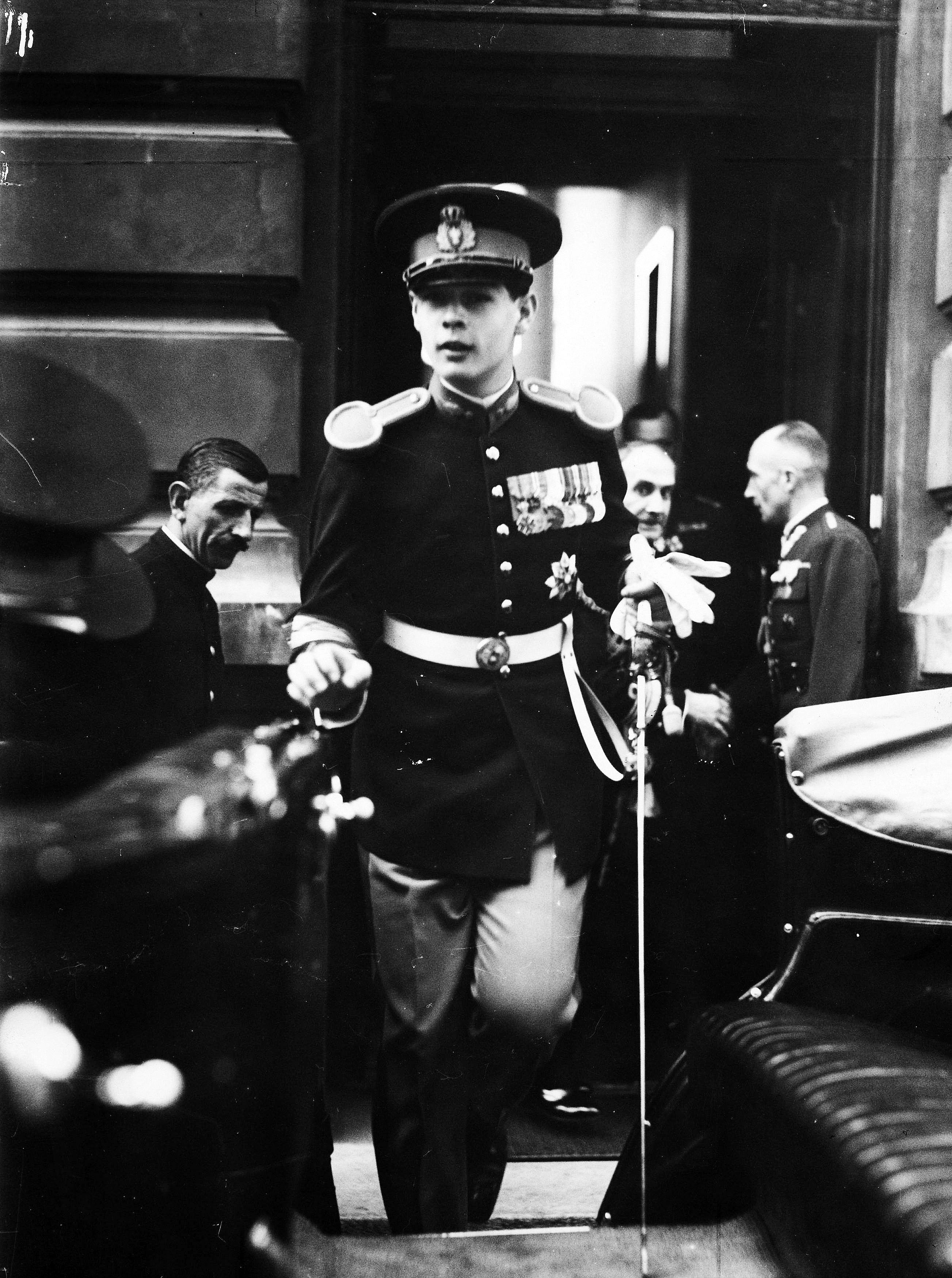 Następca tronu Rumunii książę Michał opuszcza gmach Głównego Inspektoratu Sił Zbrojnych po spotkaniu z Marszałkiem Polski Edwardem Śmigłym-Rydzem.